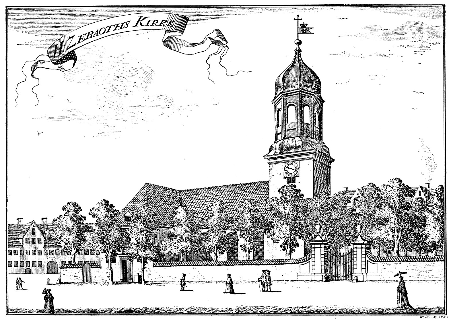 Garnisons Kirke, København - Garrison Church, Copenhagen, Denmark